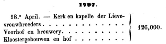 Opbrengst openbare verkoop 17 april 1797